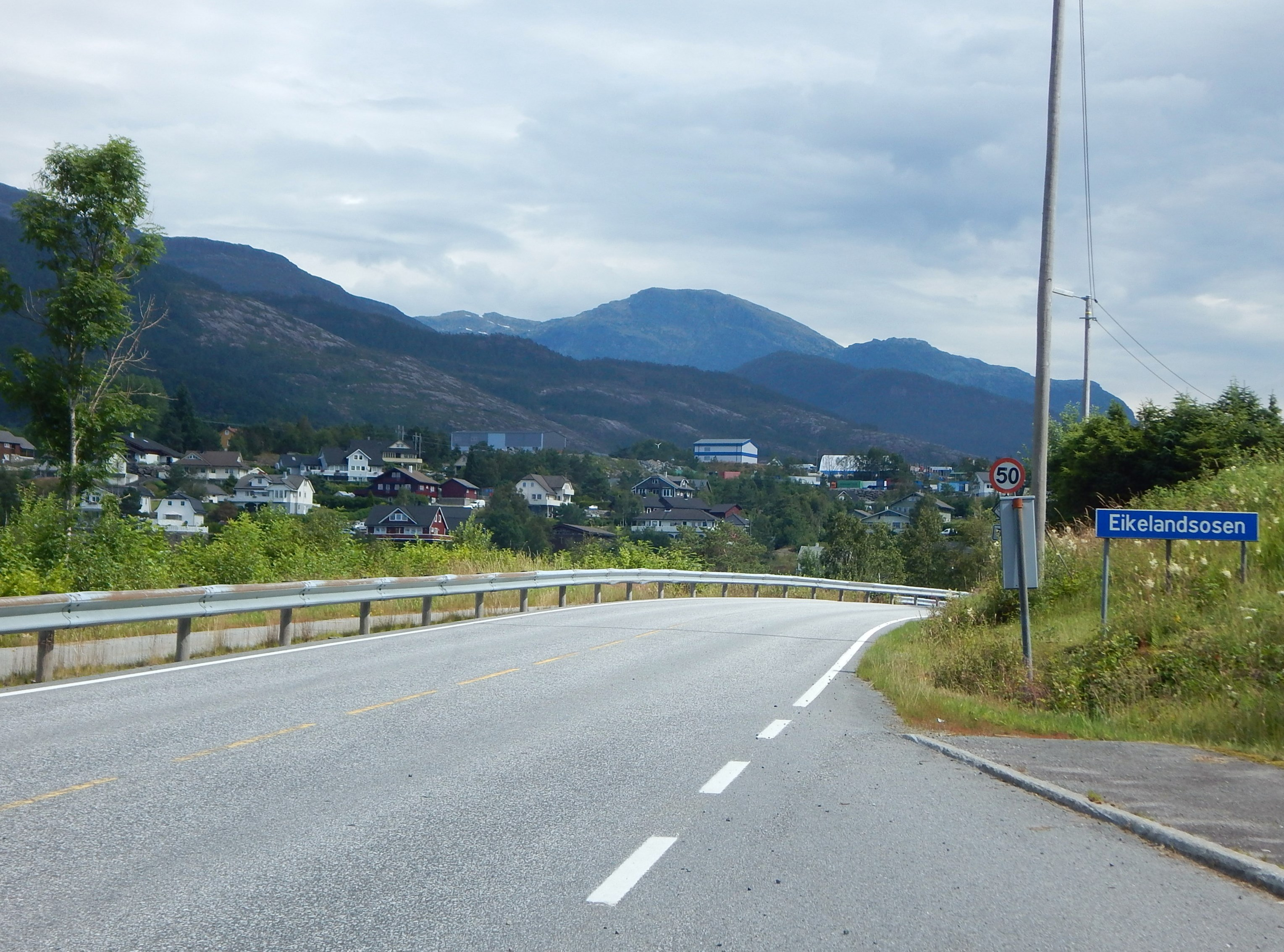 Fusavegen (fylkesvei 552) inn mot Eikelandsosen fra sørvest